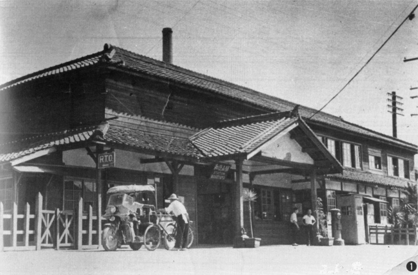 和歌山駅(現・紀和駅)に設置されたRTO。拡大すると駅名板が読み取れる。下部に「21.3」と書いてあるようだがはっきりしない。